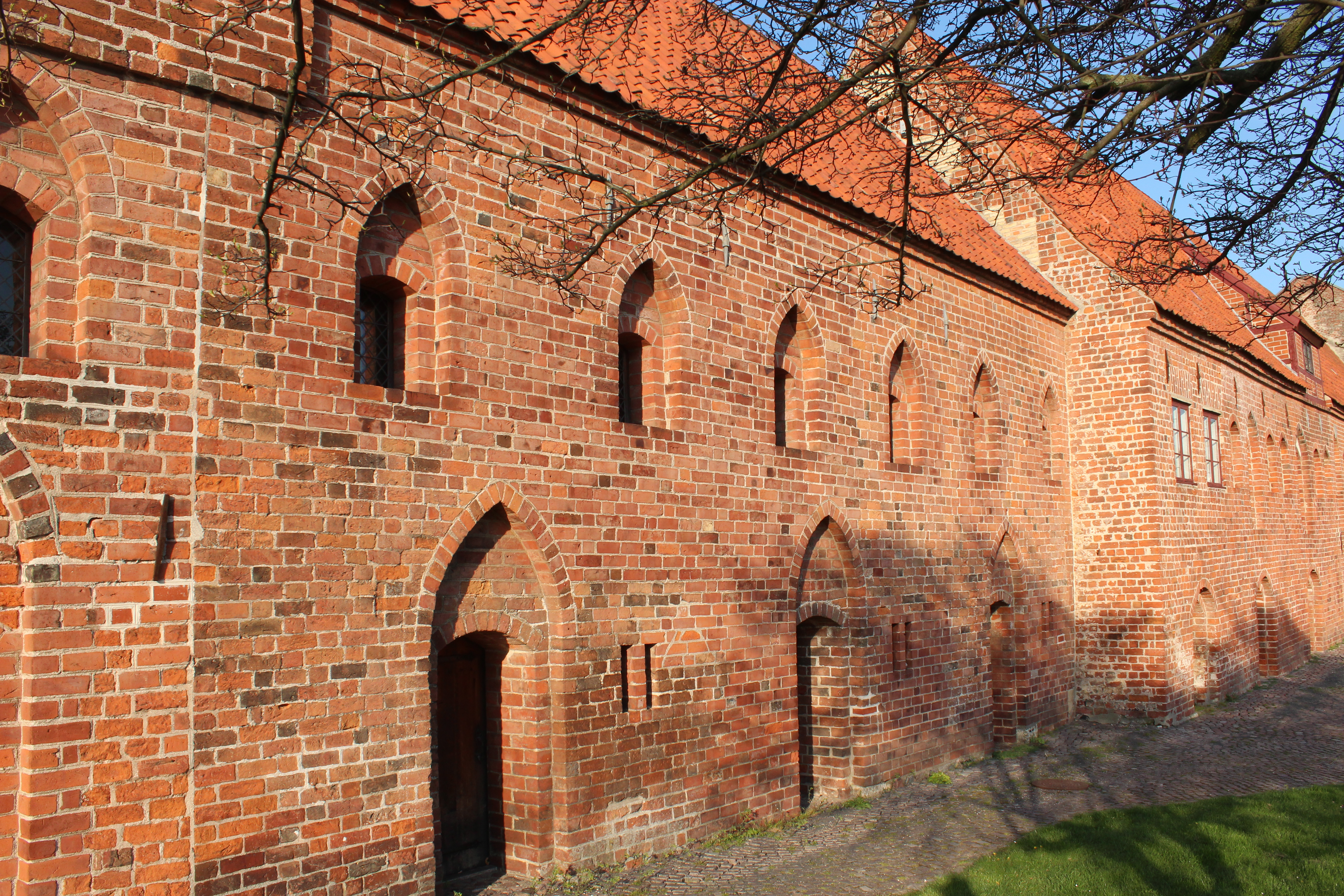 Bagsiden af Vesthuset, der er den mellemste af Boderne.